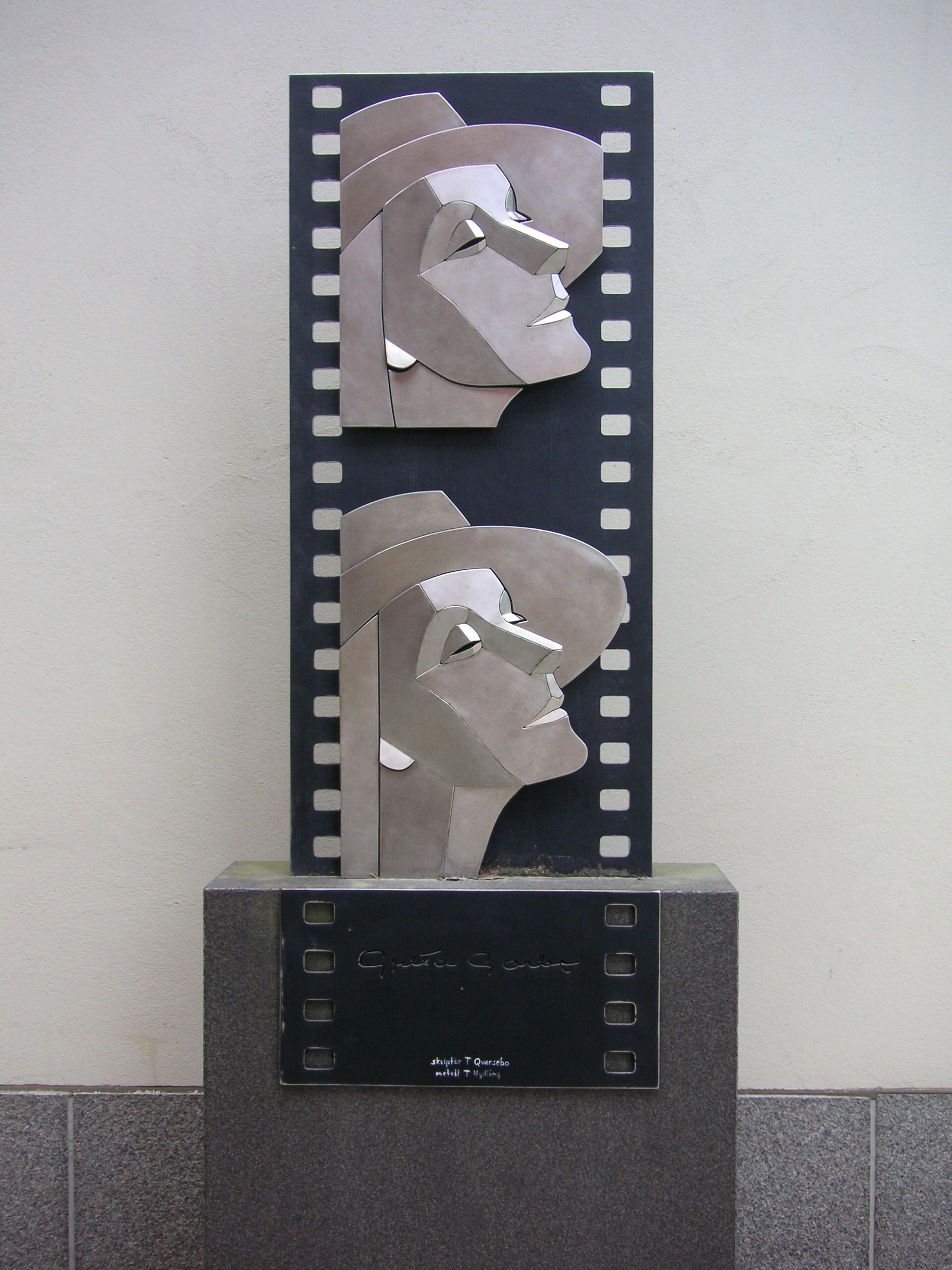 Skulptur "Greta Garbo" av Thomas Qvarsbo i Filmstaden i Solna